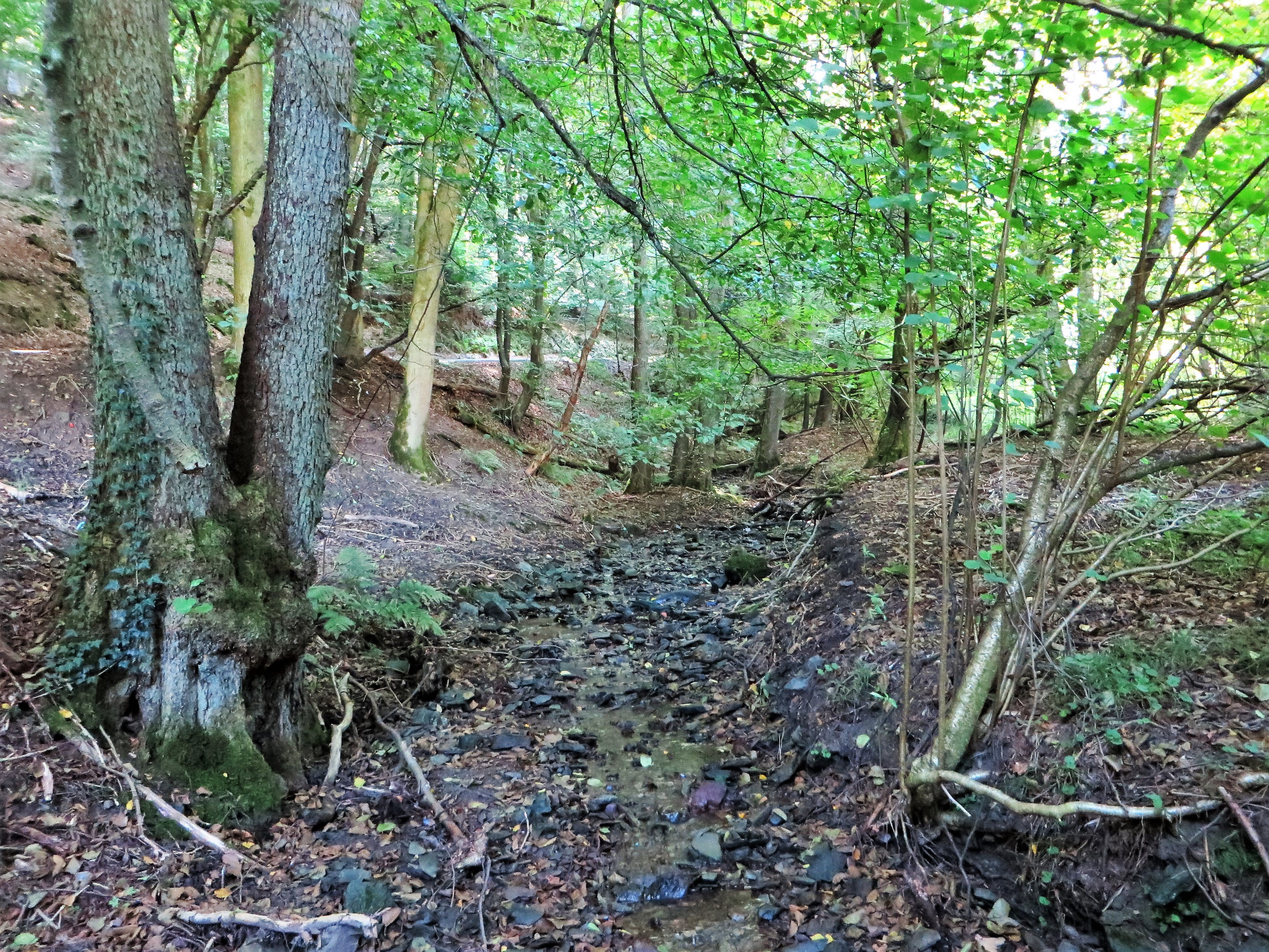 Geschützter Landschaftsbestandteil 1.4.2.80 „Rumscheider Bach“ in Hagen-Dahl, Rumscheider Weg. Es handelt sich um einen Abschnitt der Talaue des Rumscheider Baches östlich von Dahl mit Bachlauf, Wiesenbrachen und Auwaldfragmenten. Der Rumscheider Bach entspringt auf den Höhen bei Rumscheid und fließt in Dahl in die Volme.